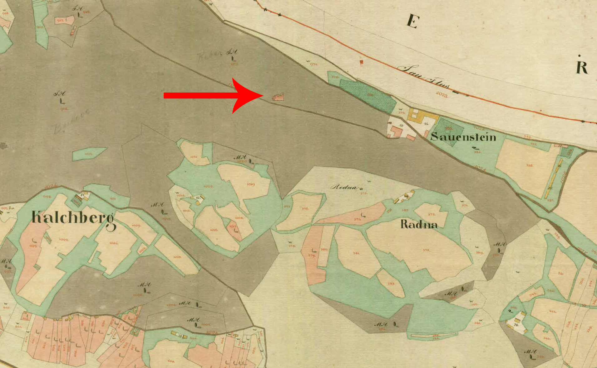 Franciscejski kataster za Kranjsko, 1823-1869